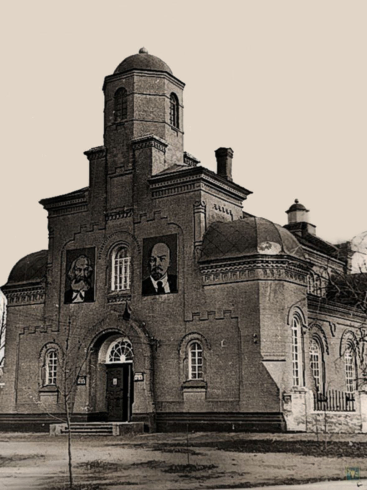 Стрітенська церква в Прилуках (середина XX ст.)